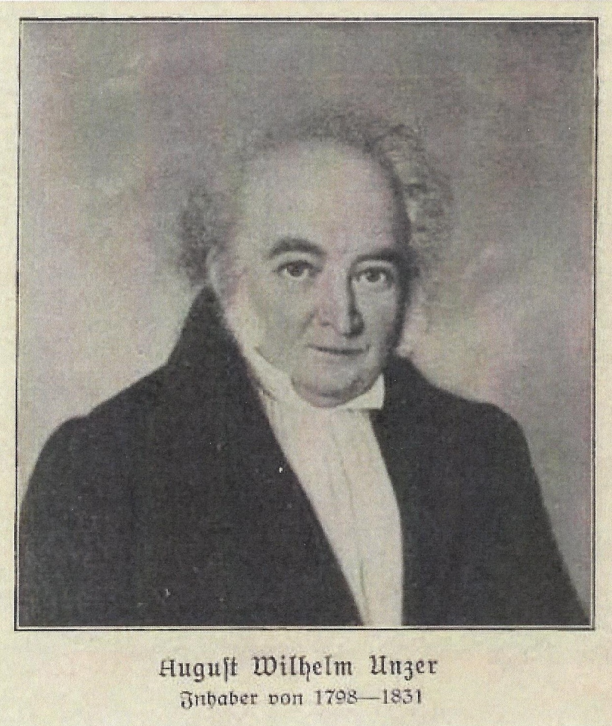 Fotografie eines Gemäldes von August Wilhelm Unzer